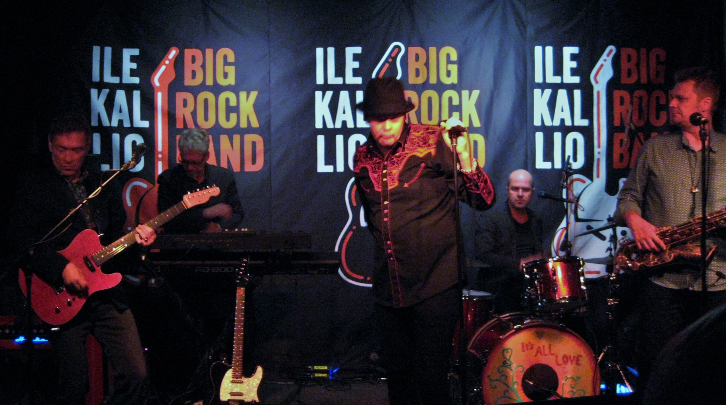 Ile Kallio Big Rock Band vuonna 2016.